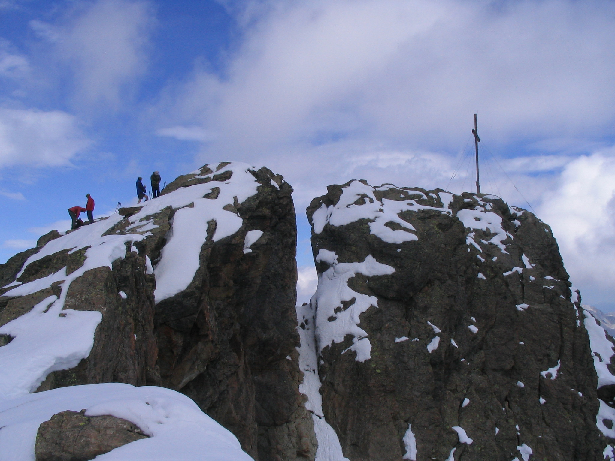 Übergang vom Südgipfel (links) zum Nordgipfel (rechts mit Kreuz) des Hohen Riffler